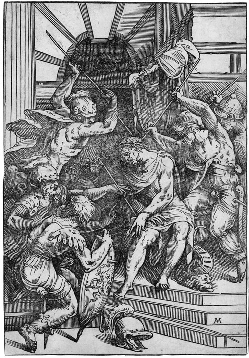 Die Komposition wurde angeregt von Tizians Gemälde für die Kirche Sta. Maria delle Grazie in Mailand, das sich heute im Louvre befindet. Von den älteren Autoren bis dahin als die Schöpfung eines anonymen Meisters beschrieben, wurde das Blatt von Francis L. Richardson in den 1960er Jahren zum ersten Mal mit Andrea Meldolla in Verbindung gebracht. Der Holzschnitt gehört zu einer Gruppe von vier Blättern Meldollas in dieser Technik, die in der früheren Literatur als anonyme Formschnitte nach Parmigianino galten. Darüber hinaus ist es das einzige Blatt, das sein Monogramm trägt. Stilistisch gehört der Holzschnitt der späteren Schaffensphase Meldollas an. Das Blatt ist in einer verfeinerten, hochentwickelten Holzschnitttechnik ausgeführt. Formale Elemente wie die Figurenauffassung, die Physiognomien der Soldaten und die bewegte, fliessende Behandlung der Draperien sind charakteristisch für Meldollas Stil der 1550er Jahre und machen die Zuschreibung an ihn überzeugend. Während die Repoussoirfigur des kauernden Kriegers mit dem Schild sich auf mehreren Gemälden Tizians dieser Epoche wiederfindet, sind die ungebändigte Dynamik und die dramatische Expressivität der Darstellung ganz eigenständige Wesenszüge der Kunst Meldollas. Ausgezeichneter Druck mit der Einfassungslinie. Verso geglättete Hängefalte, geringfügig fleckig, alte Annotation in Feder verso, sonst sehr schönes Exemplar. Selten.